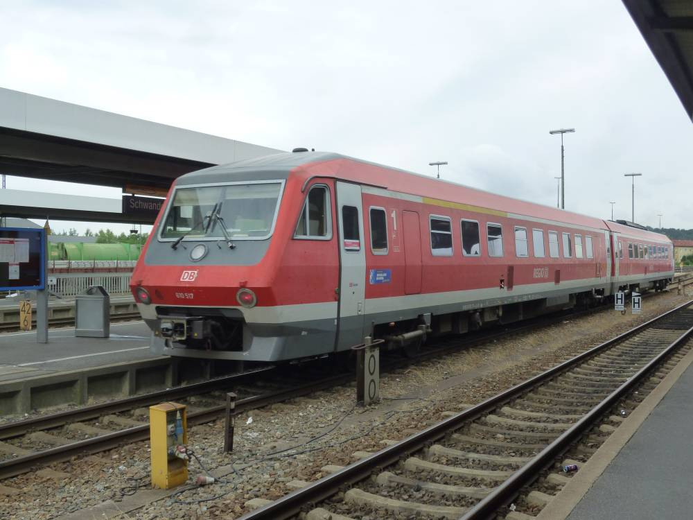 DB Triebwagen 610 517 in Schwandorf